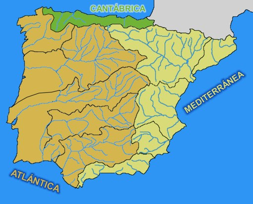 Cuencas hidrográficas de la península ibérica